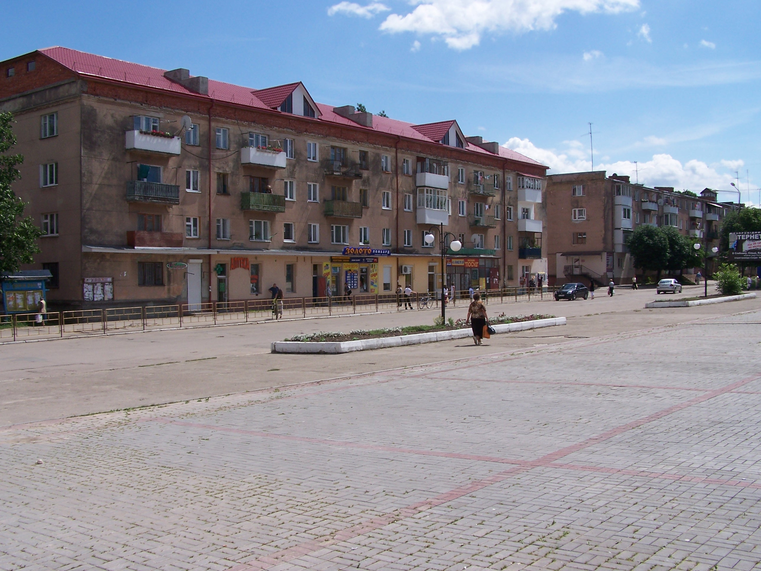 Stebnyk centrum